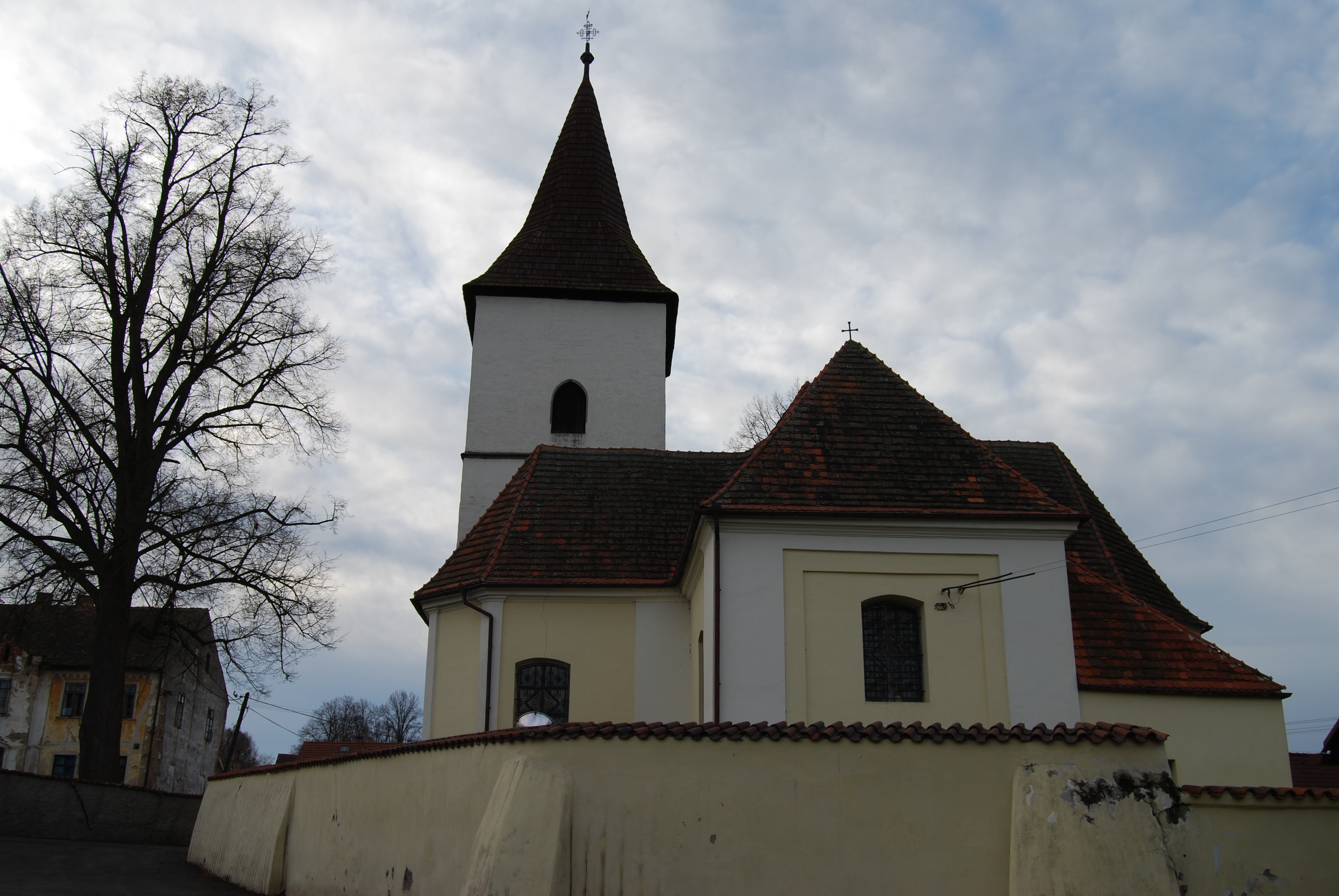 Kostel sv. Petra a Pavla v obci. Pohoří je část obce Mišovice v okrese Písek. Česká republika.